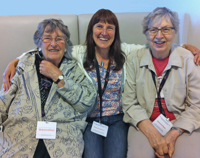 Tidligere SV-leder Berit Ås, NKF-leder Margunn Bjørnholt og tidligere NKF-leder og lagtingspresident Torild Skard på konferansen Nordisk Forum i Malmö i 2014